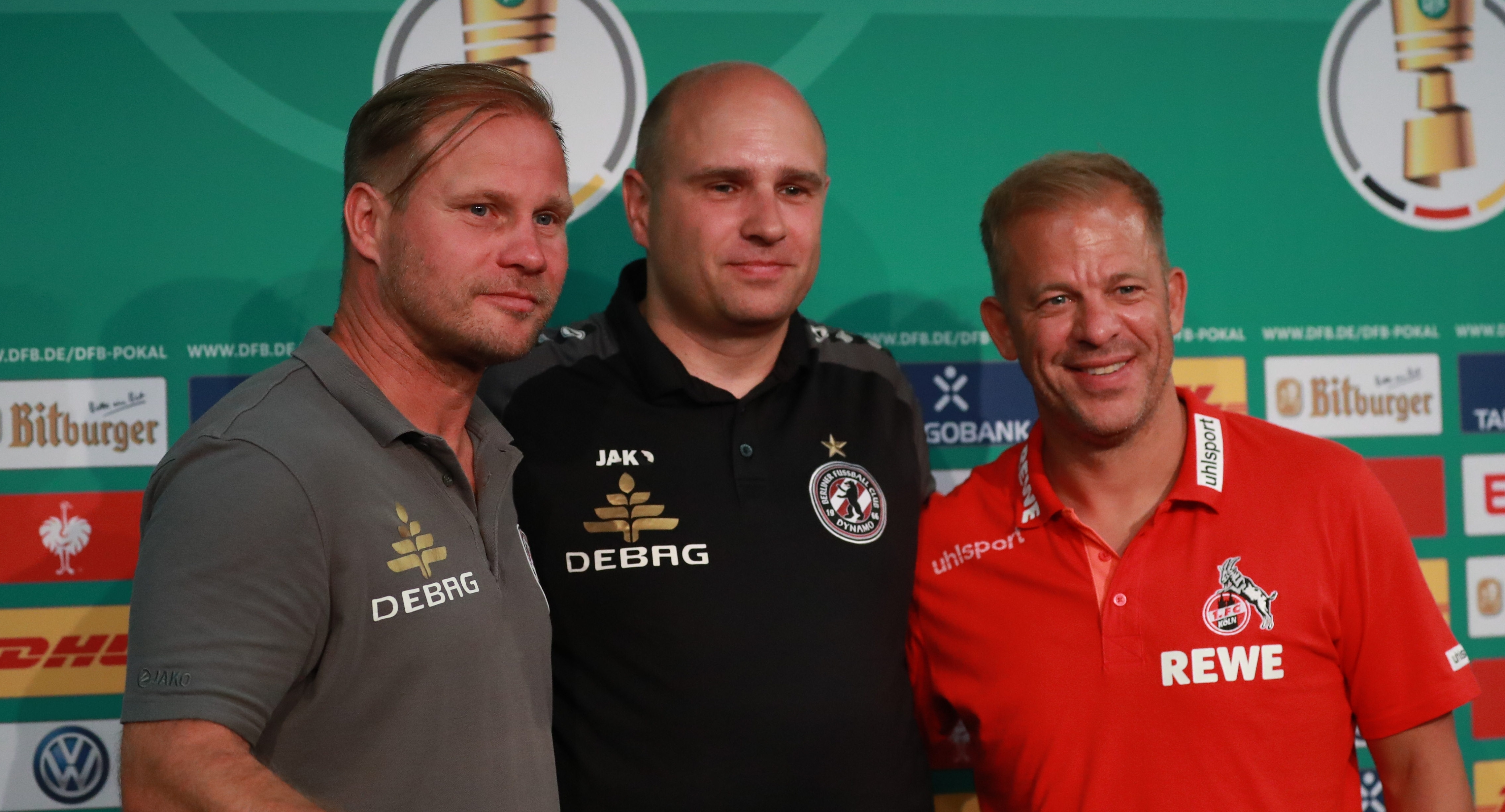 DFB-Pokal 2018/19, 1. Hauptrunde: BFC Dynamo gegen 1. FC Köln 1:9 (1:4)